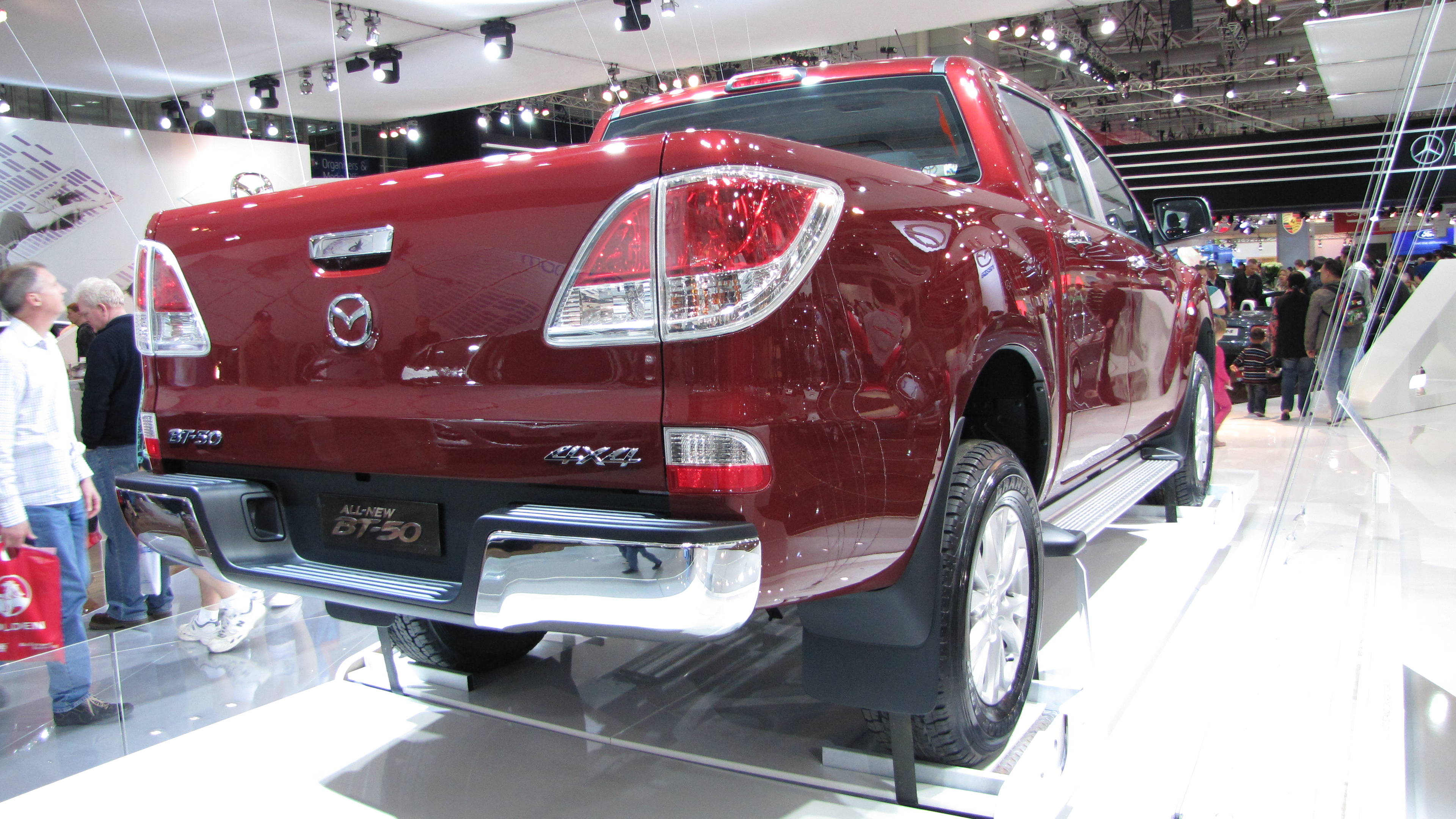 20101016_SX1IS_275